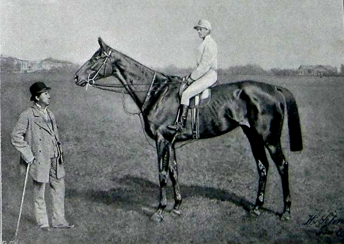 Schnaebeli, Heinrich, Berliner Fotograph und Historienmaler des 19./20.Jh. "Kincsem", Sieger im Zukunfts-Preis von Baden 1876 und Grosser Preis von Baden in den Jahren 1877, 1878 und 1879, sign., Ortsbez. Berlin, Öl/Lw., 55 x 73 cm, minim. besch., Provenienz Internationaler Club Baden-Baden e.V.